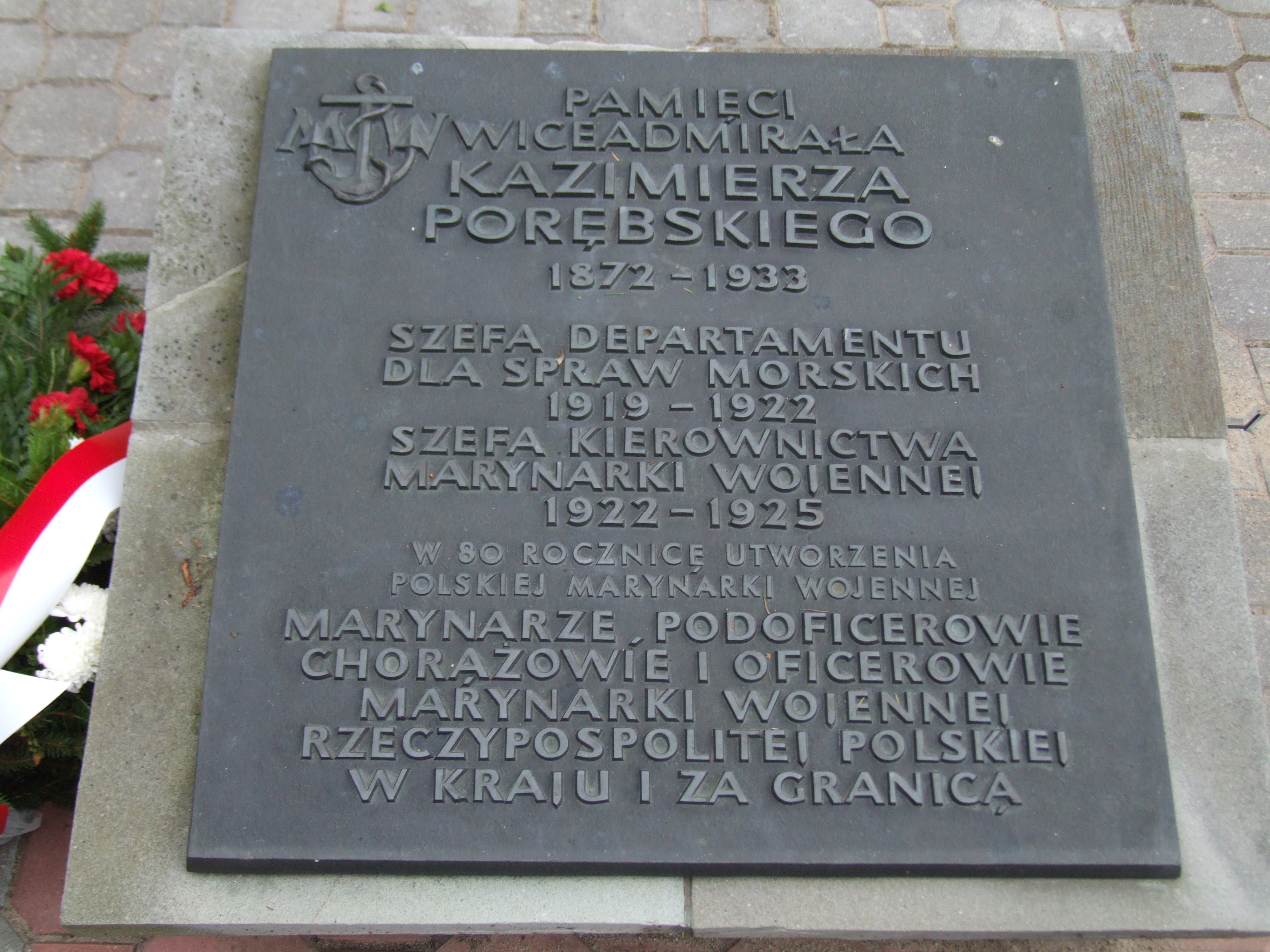 Gdynia-Oksywie Cmentarz Marynarki Wojennej